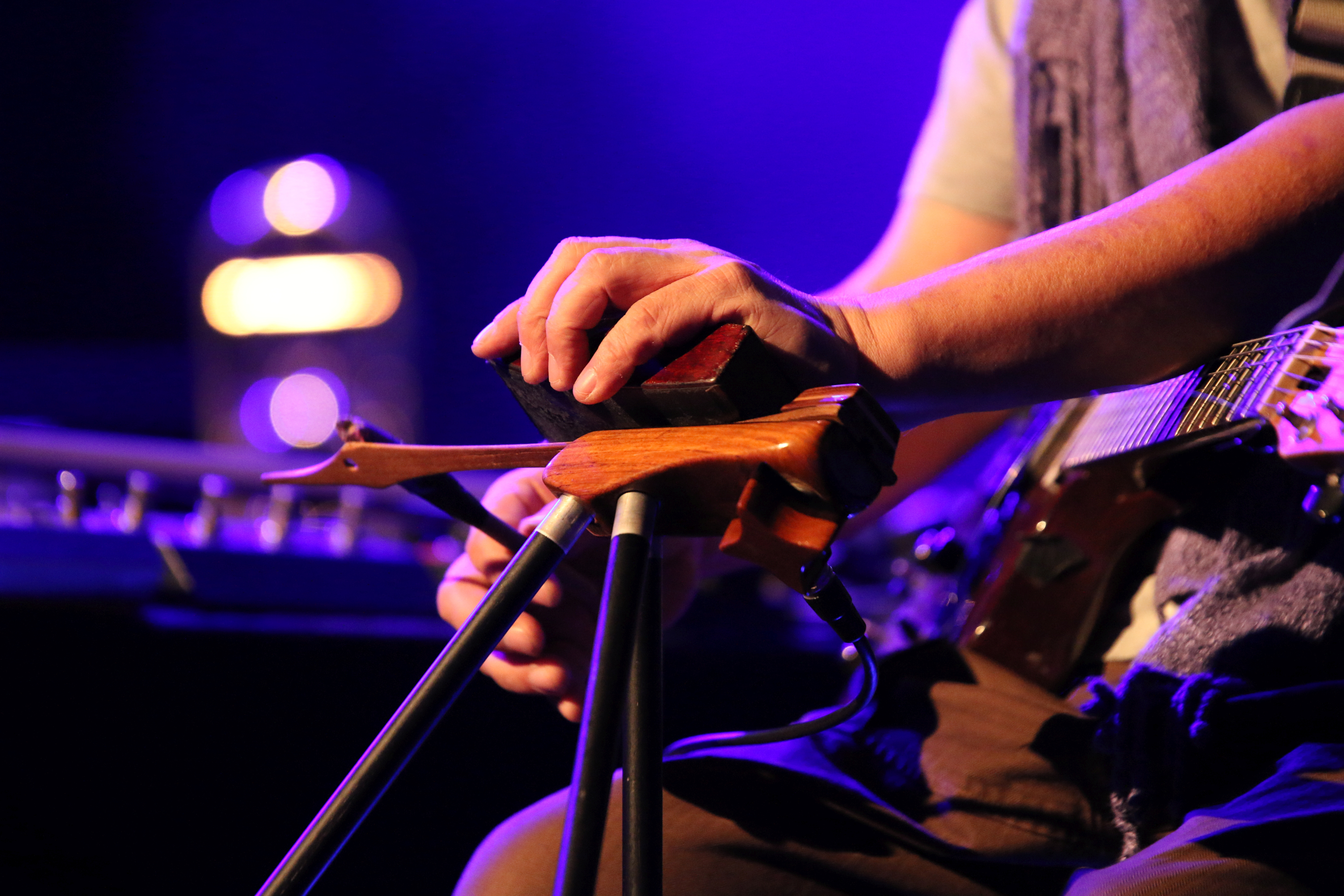 46. Deutsches Jazzfestival Frankfurt 2015: Hope: Kazuhisa Uchihashi